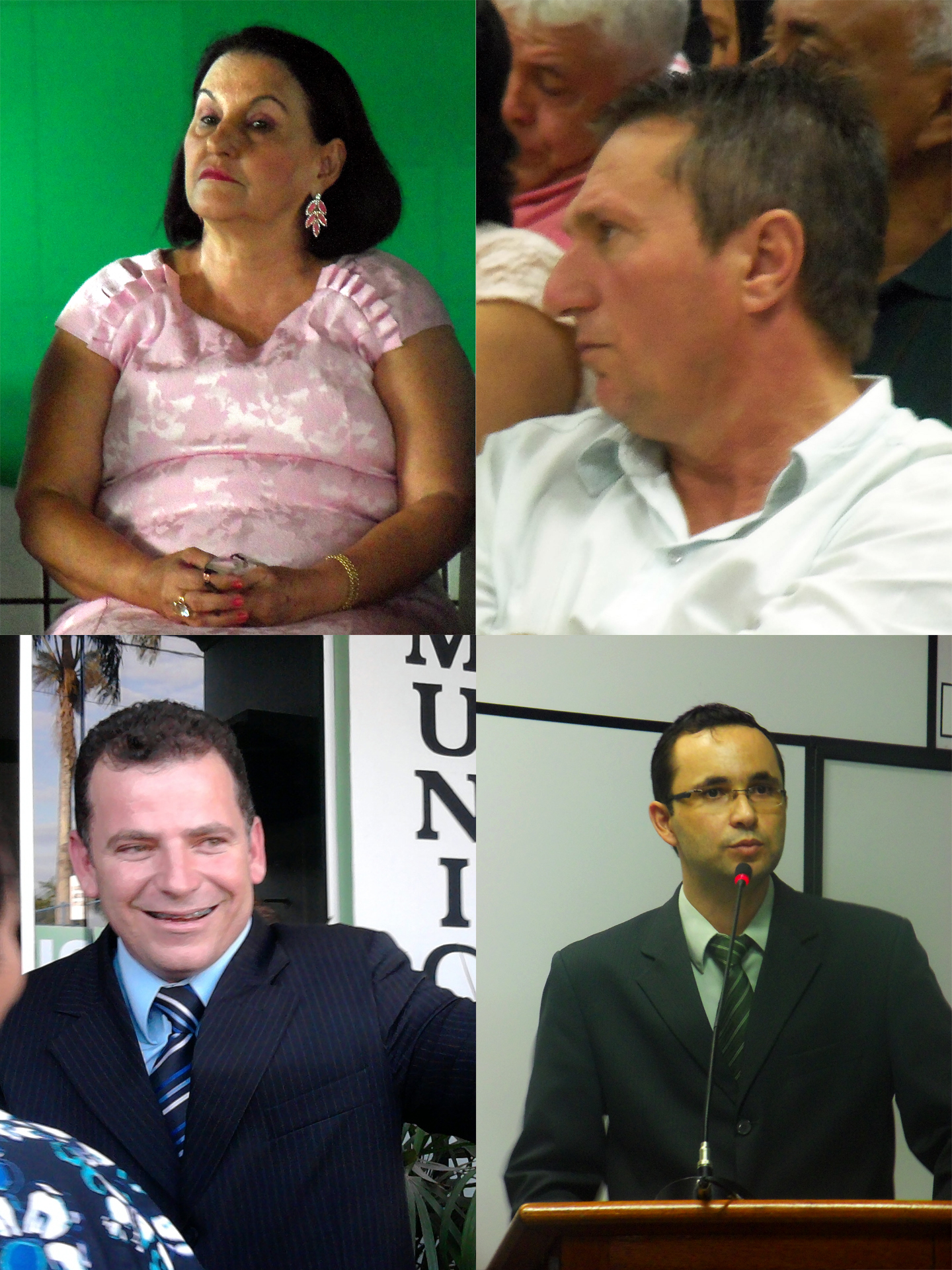 Prefeitos de Fundão entre 2005 e 2013. Montagem com as fotos File:Maria Dulce Rudio Soares.jpg, File:Marcos Fernando Moraes.jpg, File:Anderson Pedroni Gorza.jpg e File:Claydson Pimentel Rodrigues.JPG.